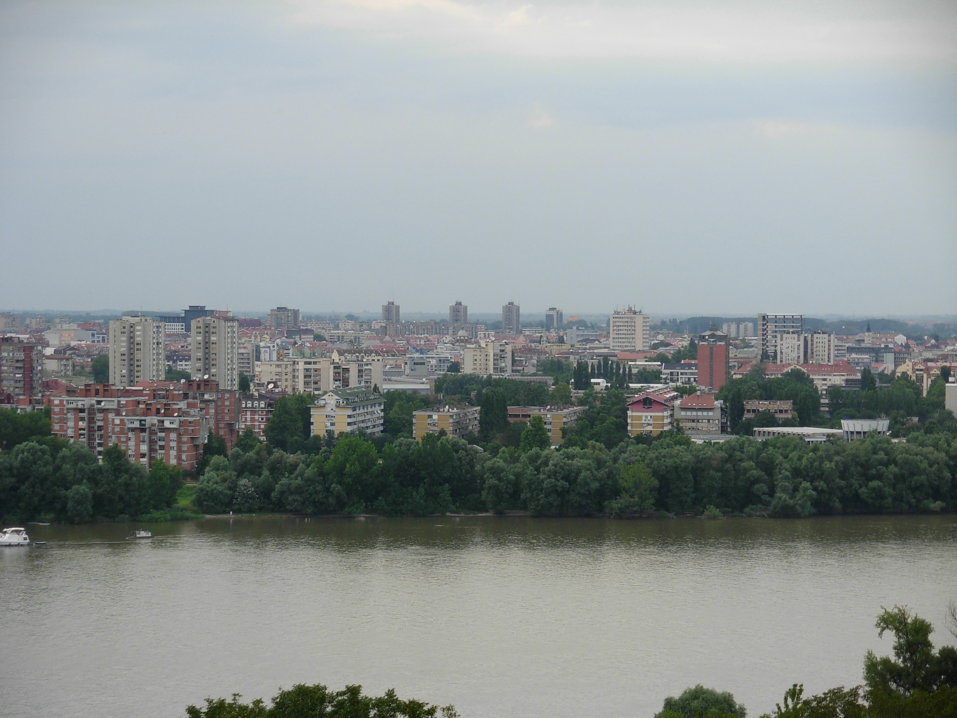 Pogled na Novi Sad sa Kameničkog puta (ispred zgrade srušene televizije).